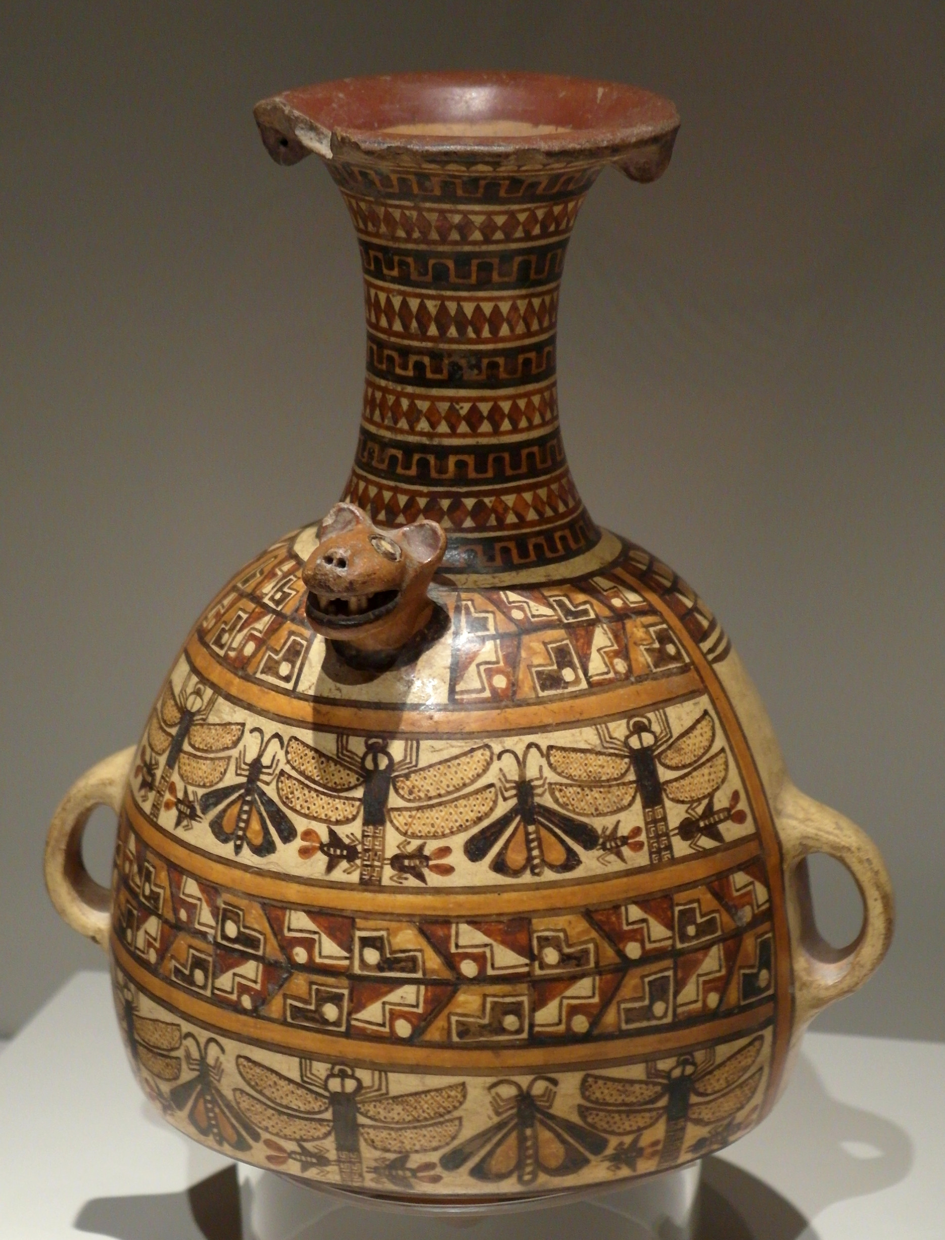 Urpu para la chicha, inca.